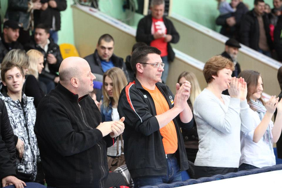 Одарич на грі Черкаських мавп з Бродським